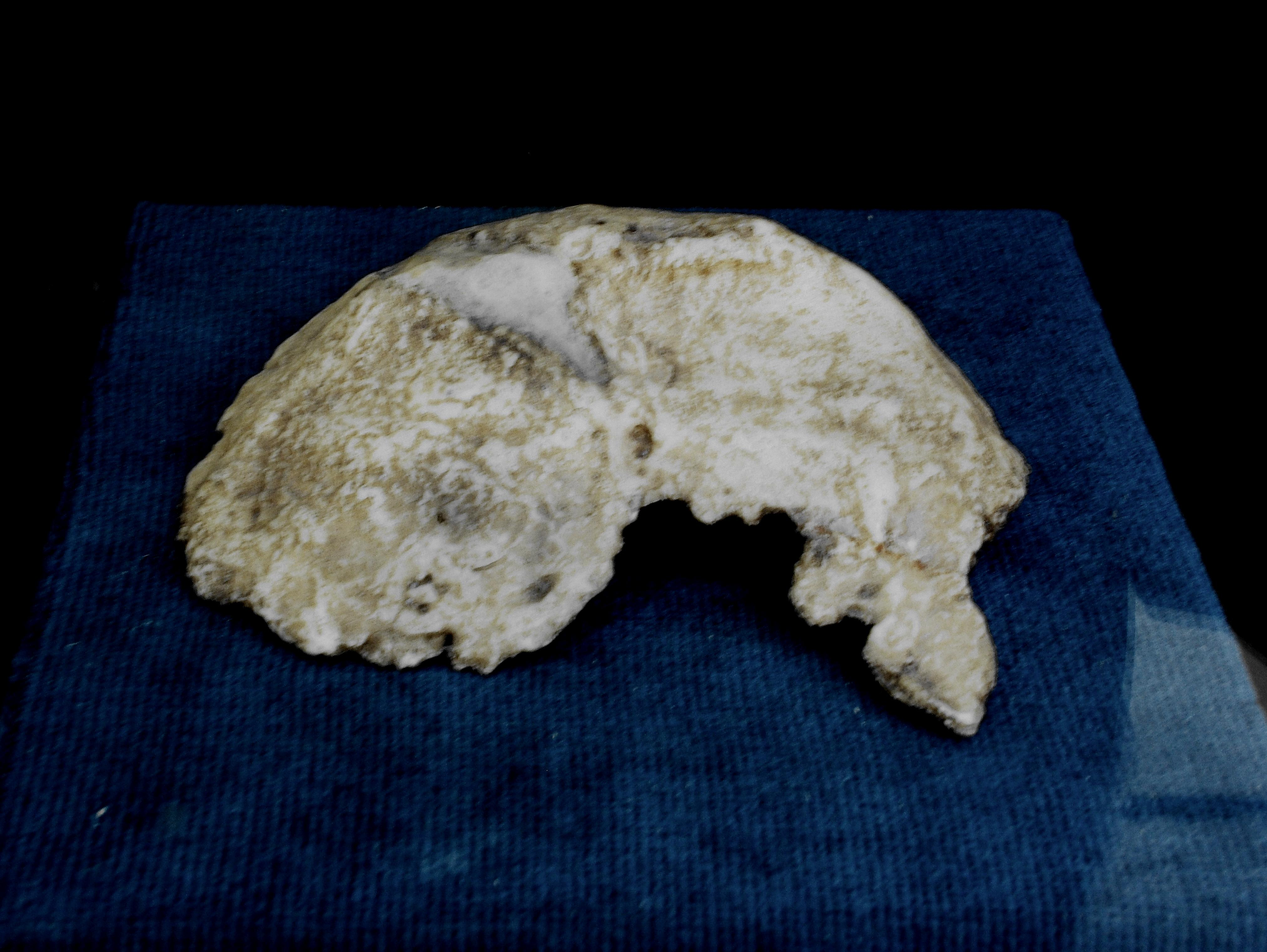 Őskőkori előember koponyacsontja (Vértesszőlős Őstelep)